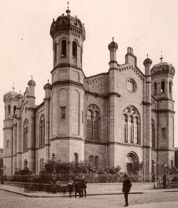 Liberale Synagoge in Darmstadt